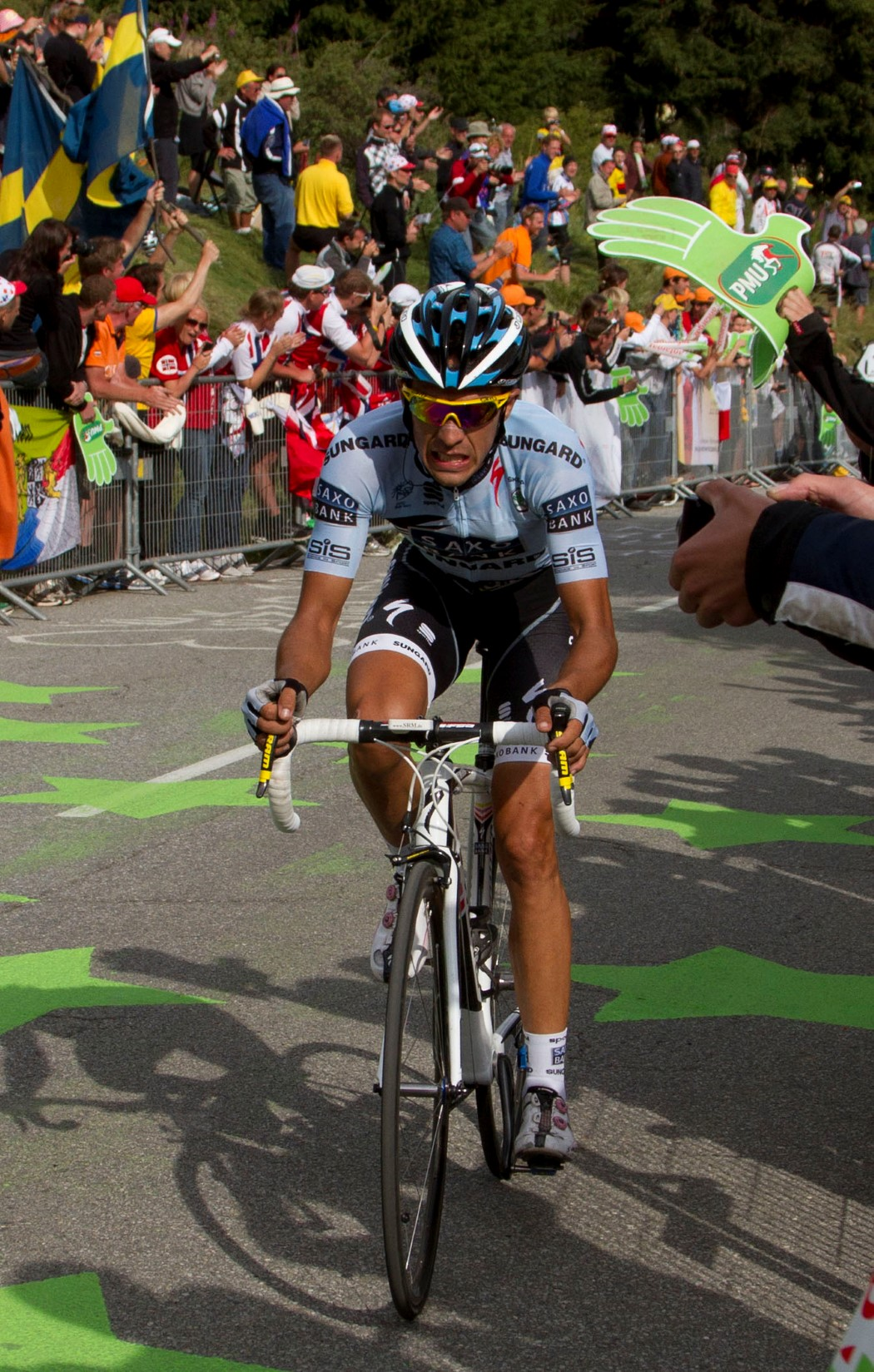 alpedhuez 055 contador